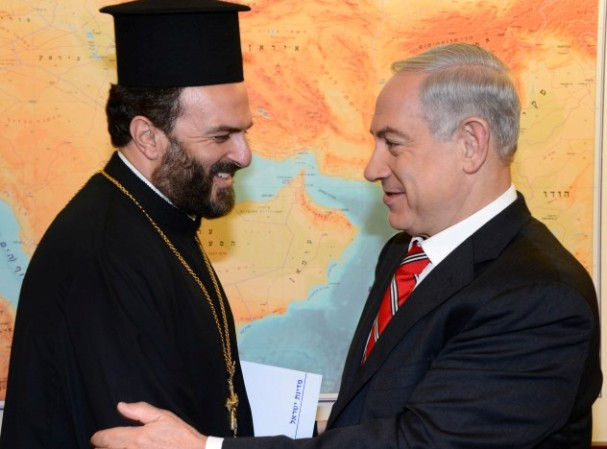 ראש הממשלה נתניהו והכומר גבריאל נדאף, אוגוסט 2013